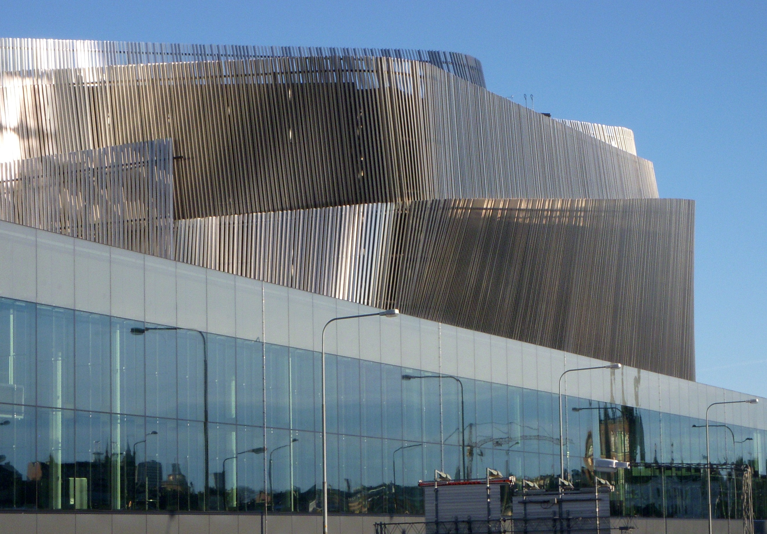 Stockholm Waterfront Building, fasad mot väst